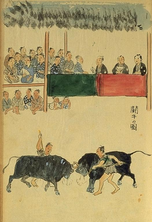 《德之島事情》插圖